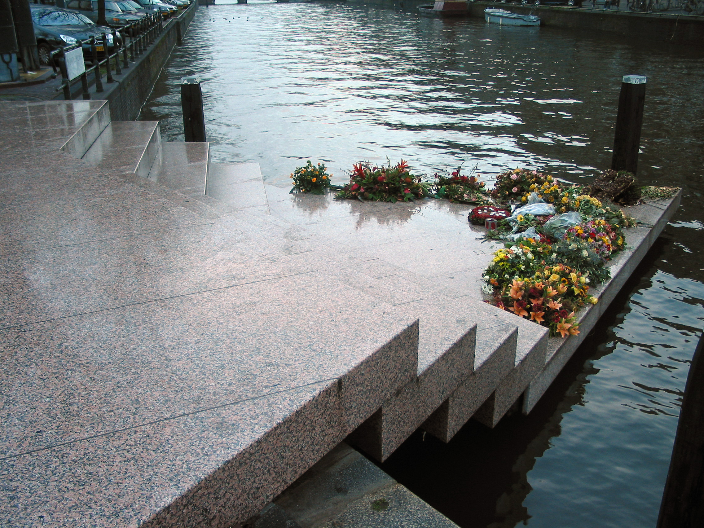 Homomonument, Amsterdam, Steps